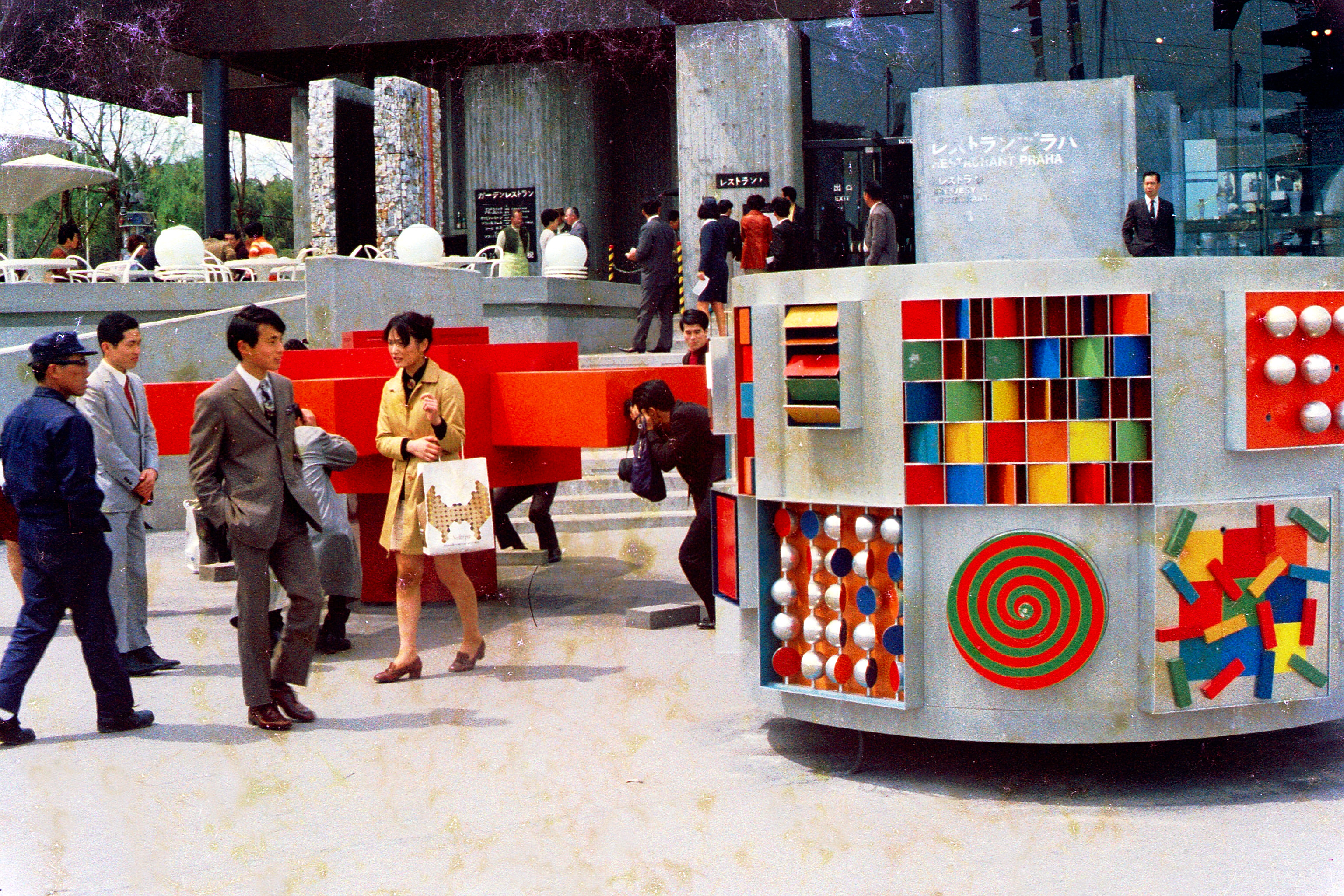 Restaurant Praha Osaka Expo'70. April 1970.